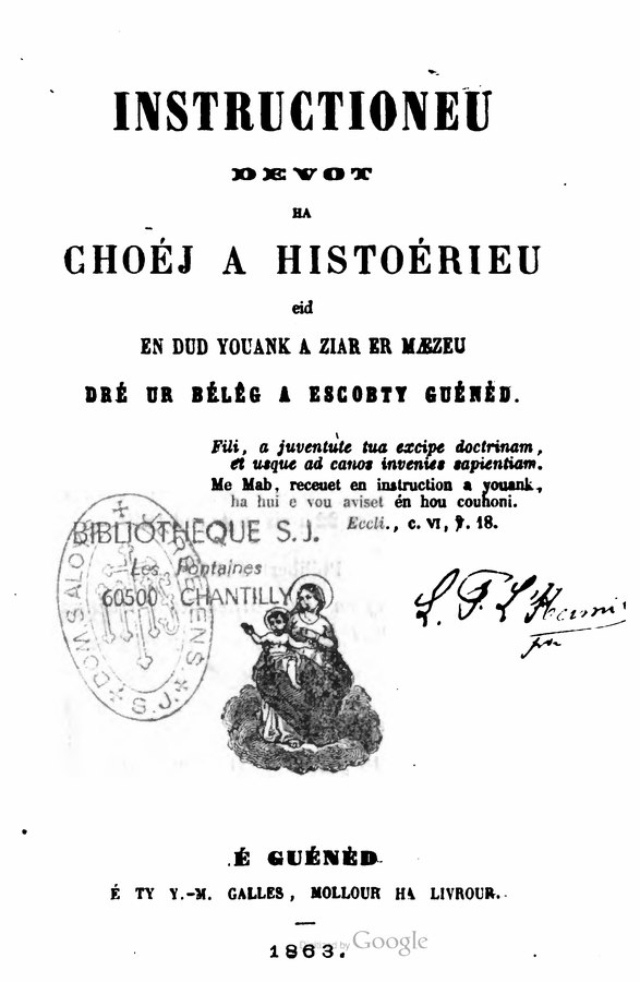 front page 1841